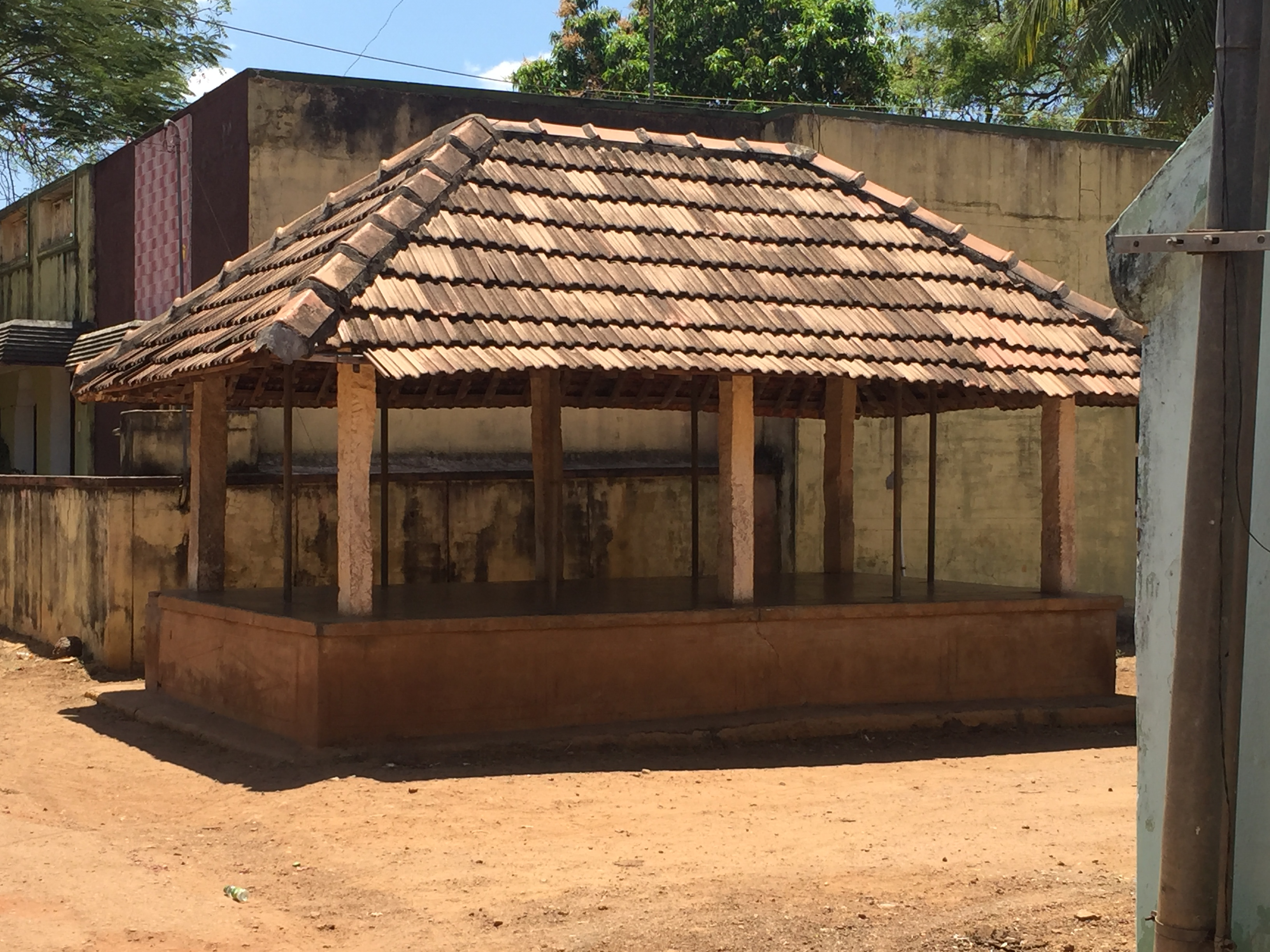 இது காரைக்குடி அருகே உள்ள அமராவதிபுதூரில் உள்ள ஒரு முளைப்பொட்டல்.